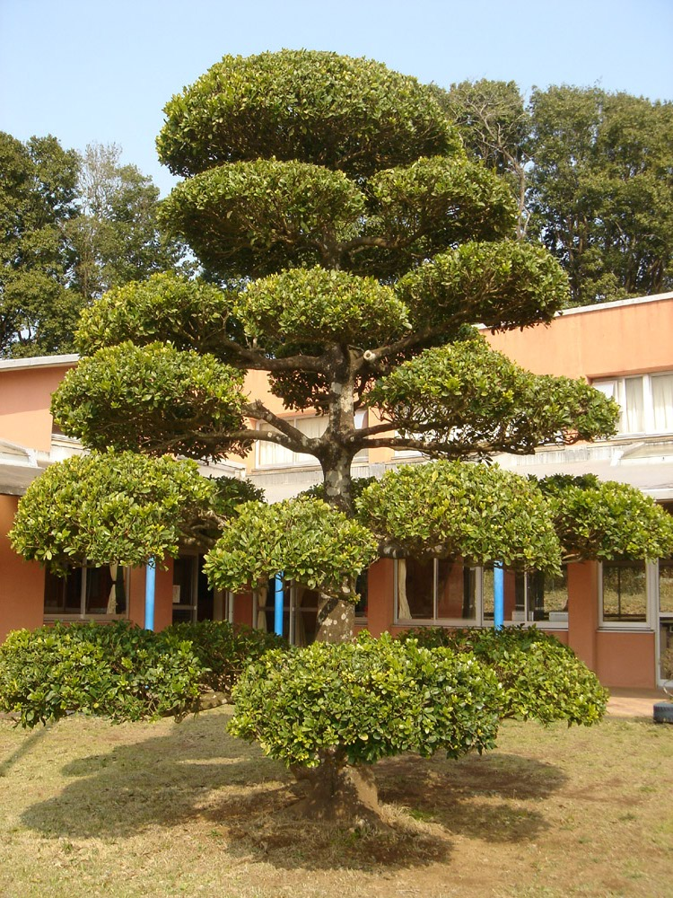 Japanese tree